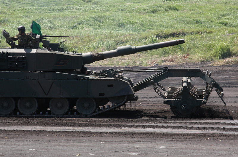 92式地雷原処理ローラを装着した陸自90式戦車。平成21年度富士総火演の予行にて。